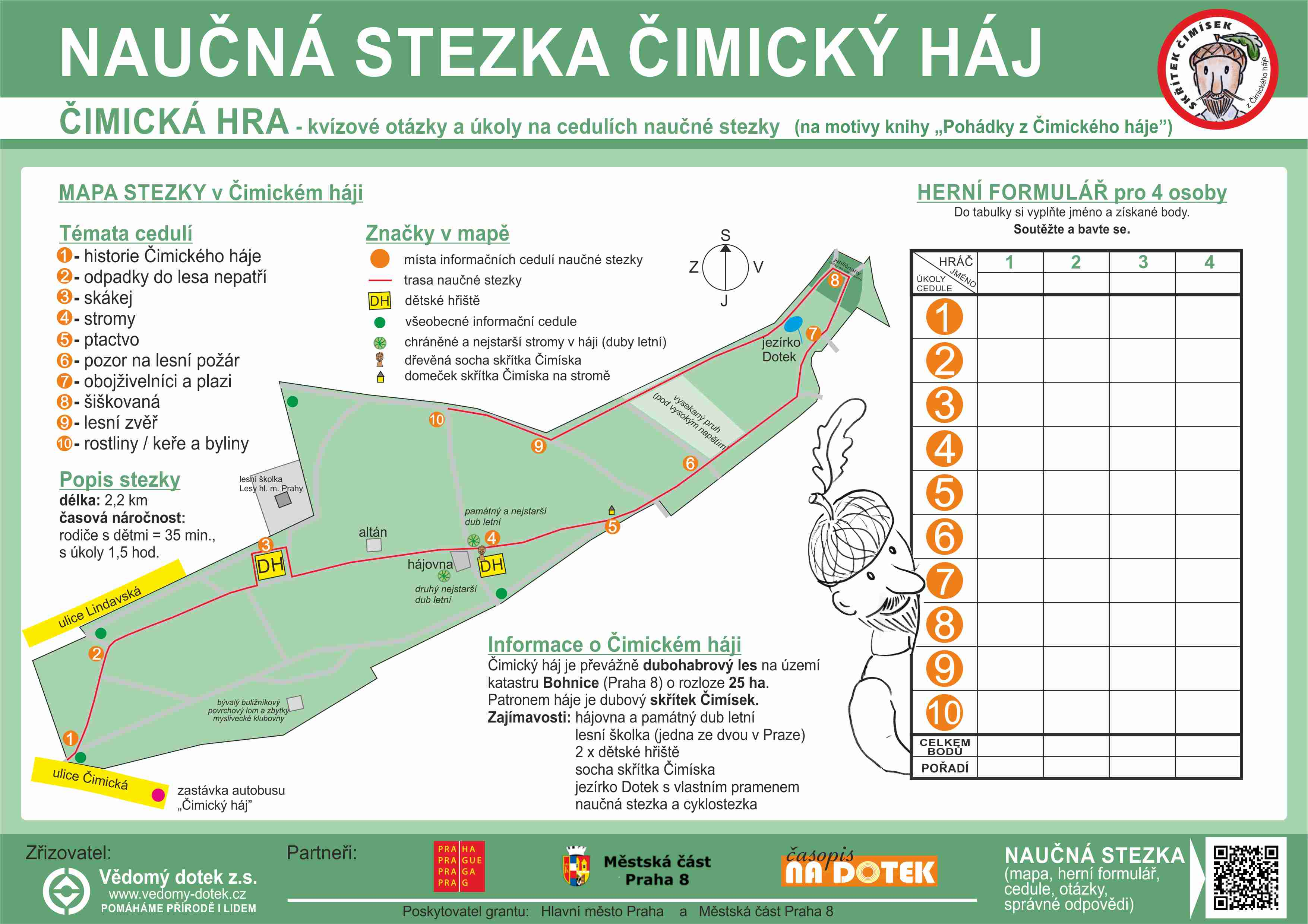 Stezka Čimickým hájem